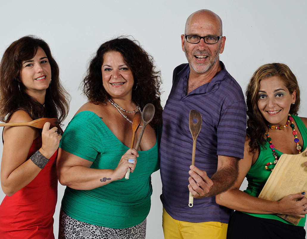 Arranco de Varsóvia